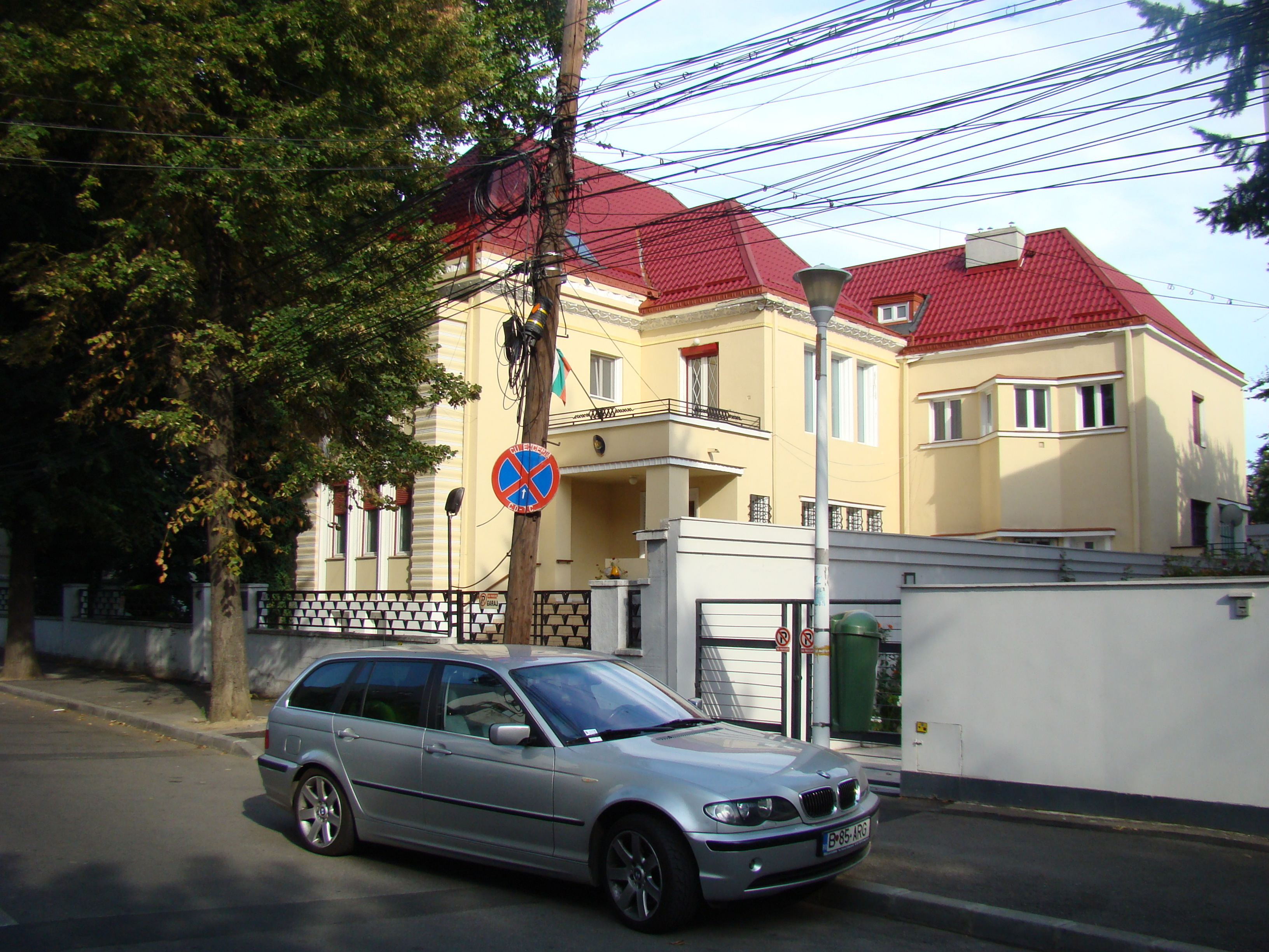 Casă monument istoric, str. Aleea Alexandru, nr.14